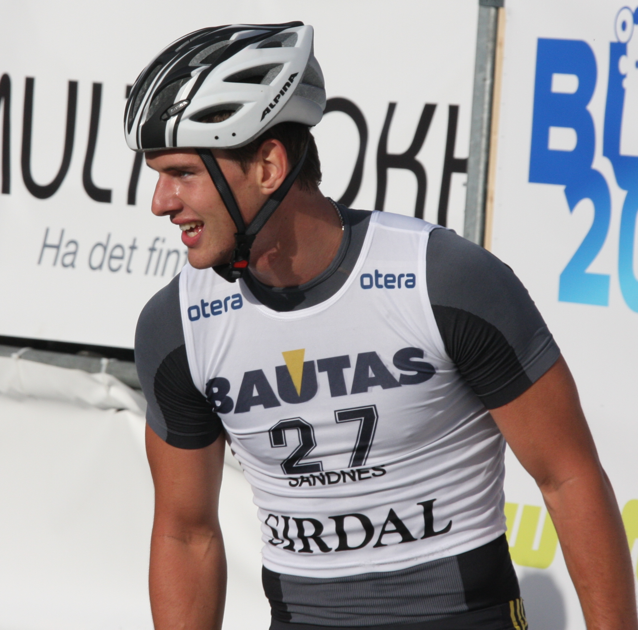 Josef Wenzl under Blinkfestivalen i Sandnes 2009